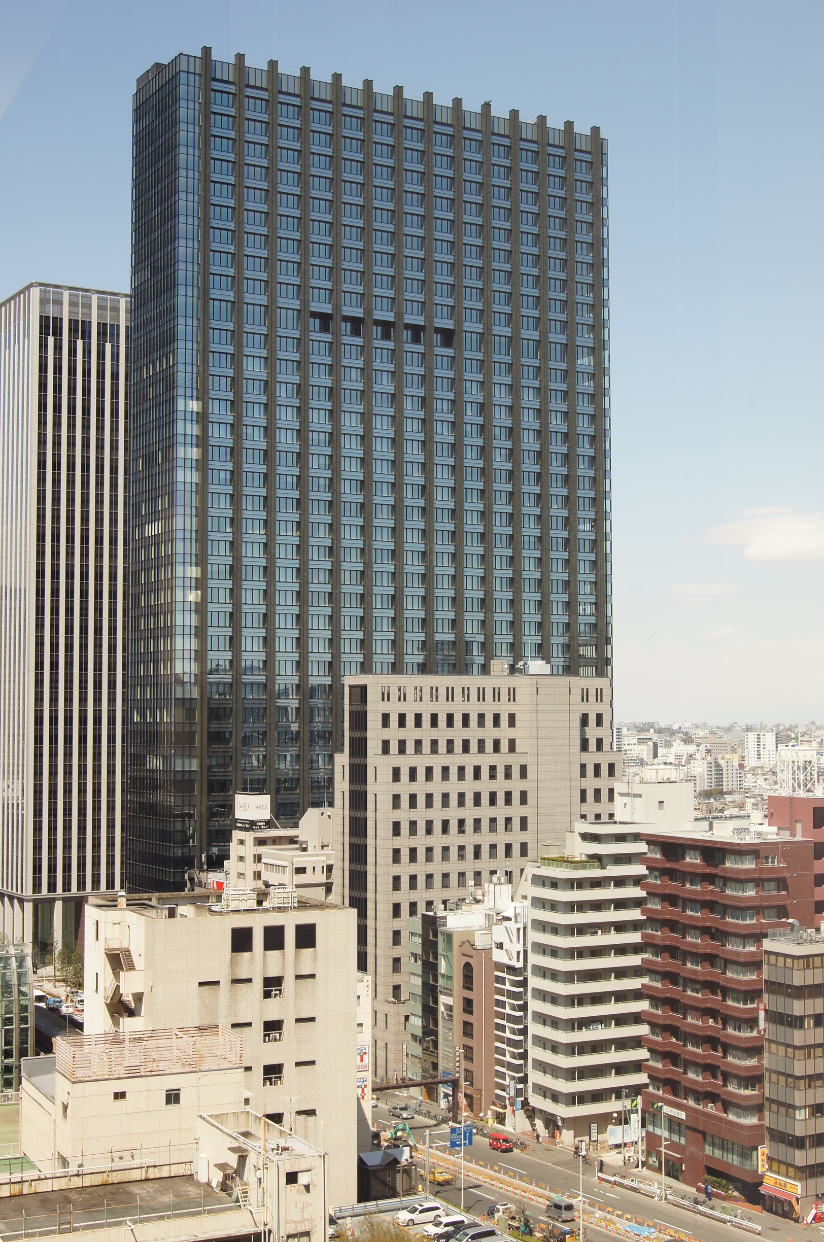 新宿グランドタワー全景。アイランドタワー12階からの撮影なので、東南方向からである。手前の建物により下部がさえぎられている。